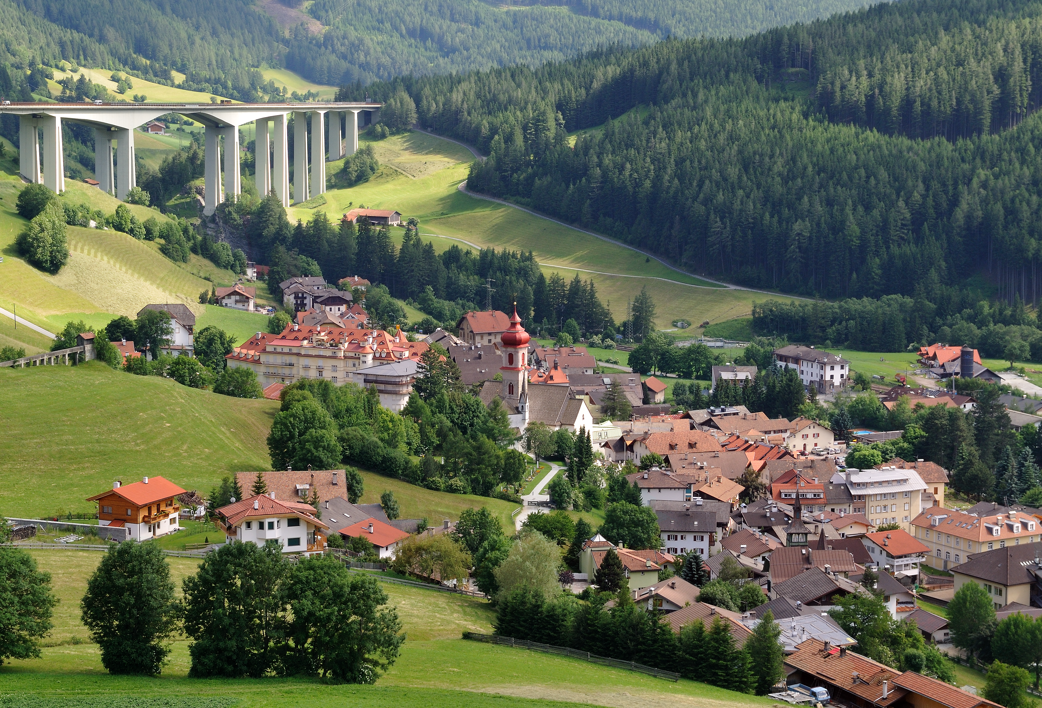 Gossensass in Richtung Südost am Sommer-Nachmittag 2008-06-28